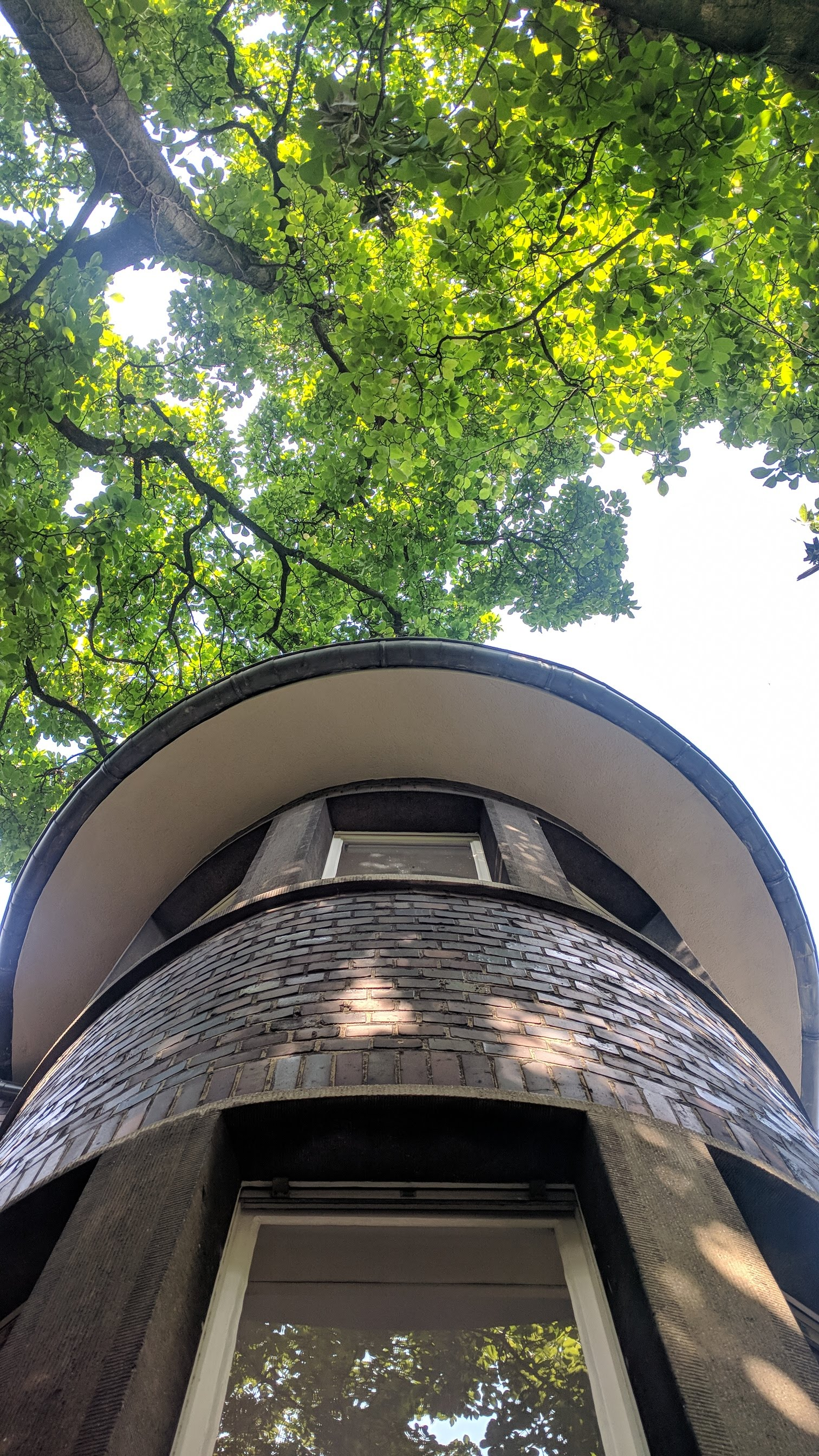 Erker der Sittardstraße 63 in 41061 Mönchengladbach